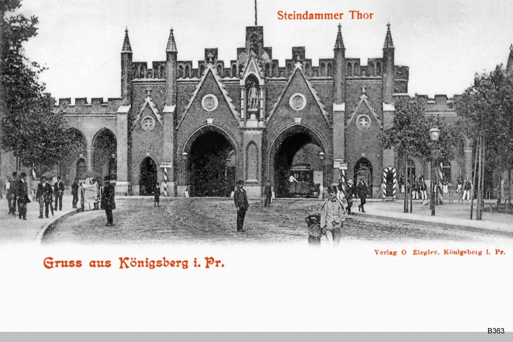 Königsberg